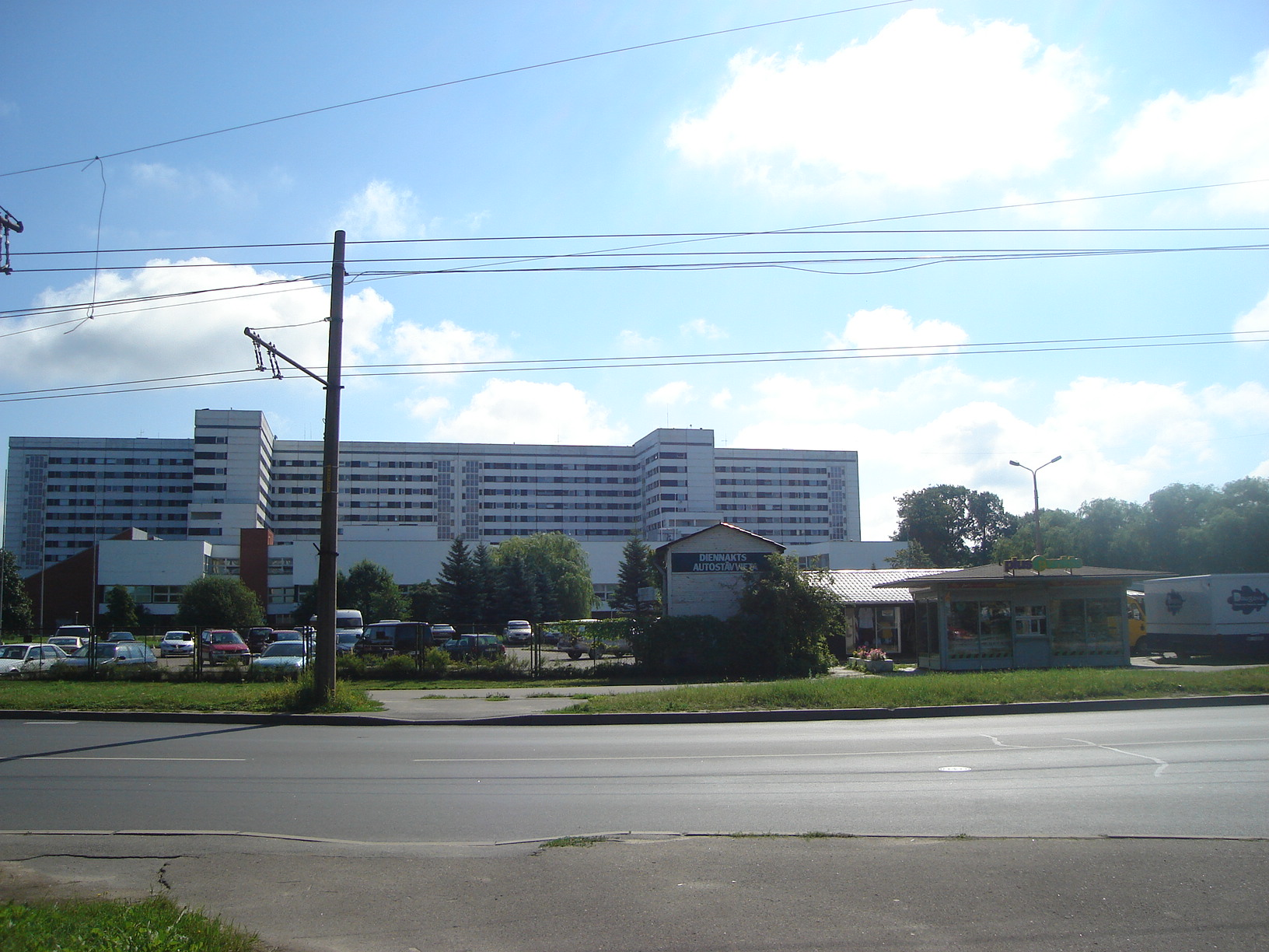 Gaiļezers slimnīca